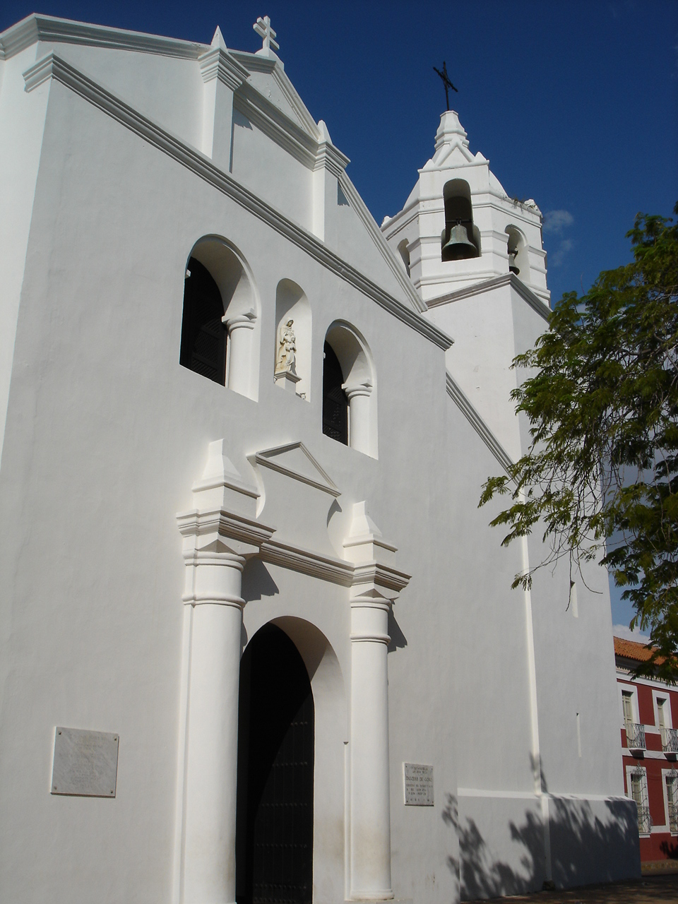 Fachada de la Catedral de Coro (Estado Falcón, Venezuela)